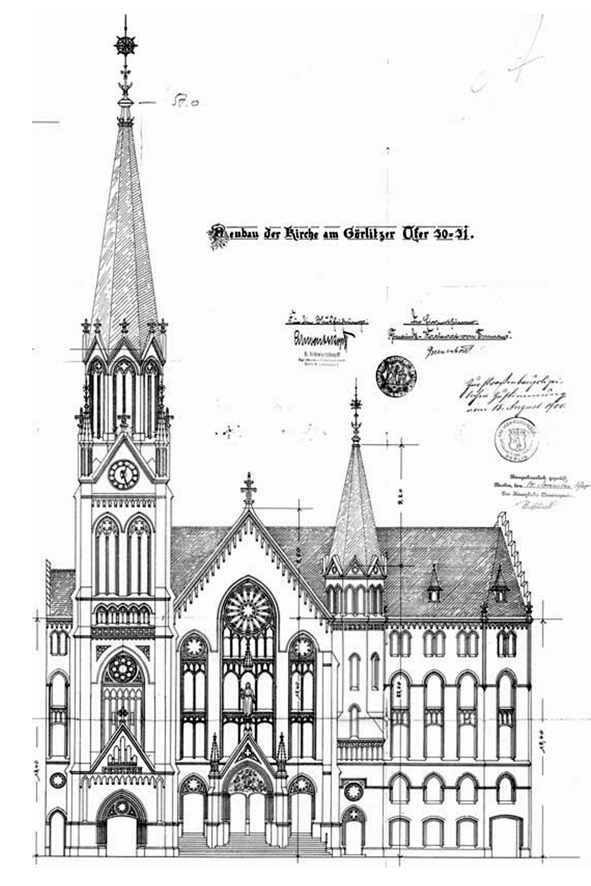 Planungszeichnung Tabor-Kirche